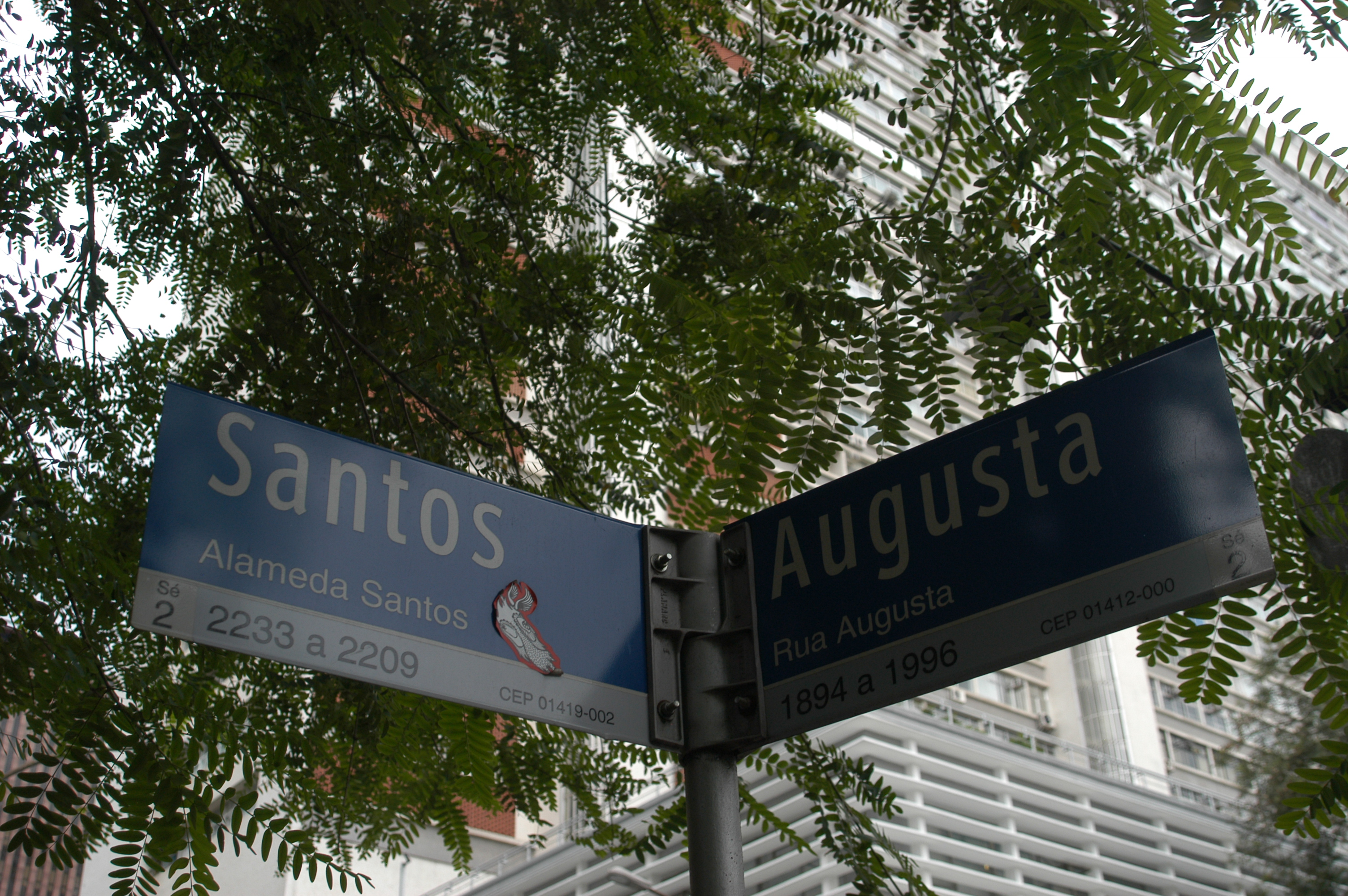 Essa é uma das mais movimentadas e famosas esquinas da capital paulista, onde se localiza o Conjunto Nacional que pode ser visto ao fundo SP